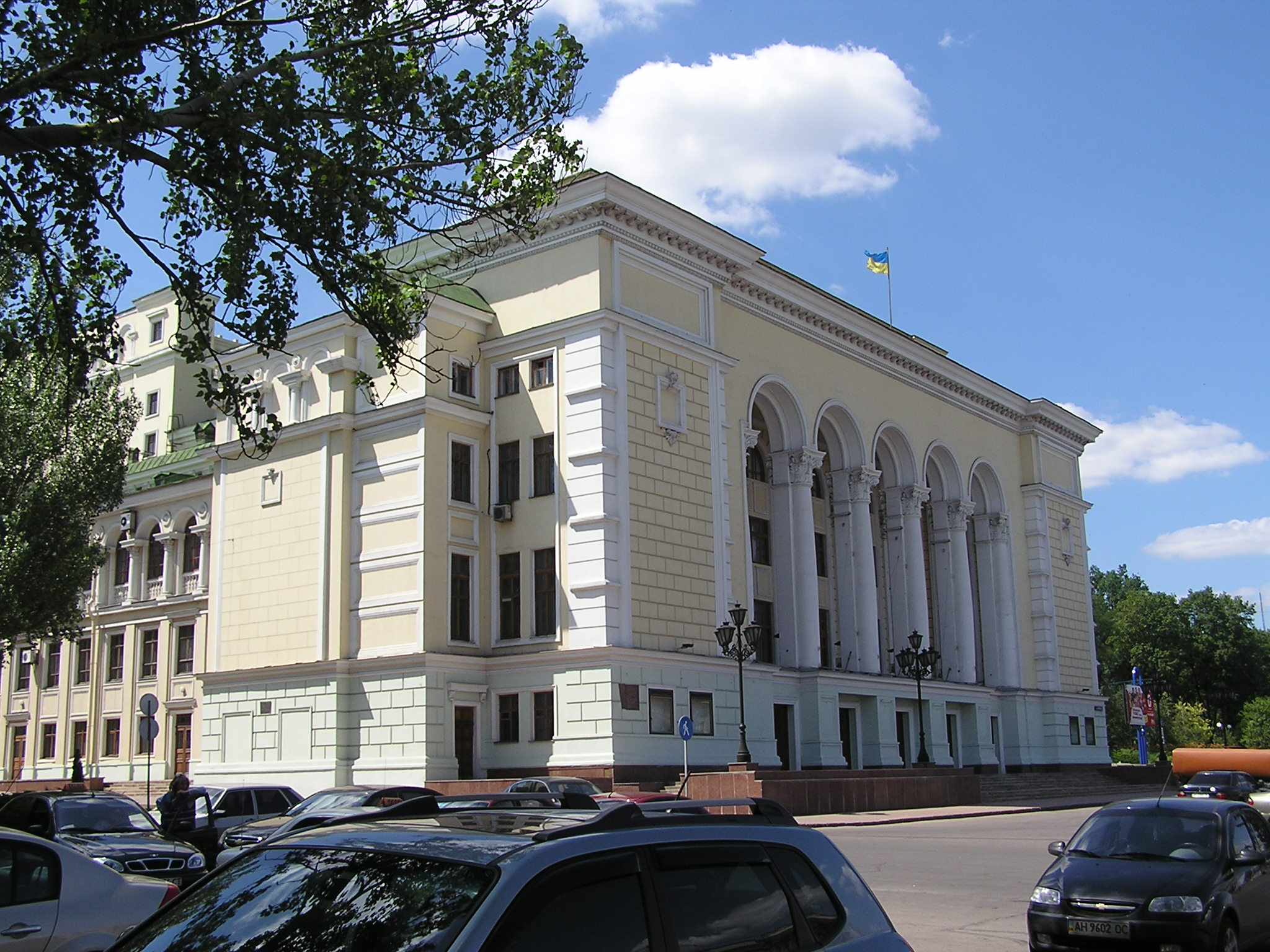 Донецкий академический государственный театр оперы и балета им. А.Б.Соловьяненко